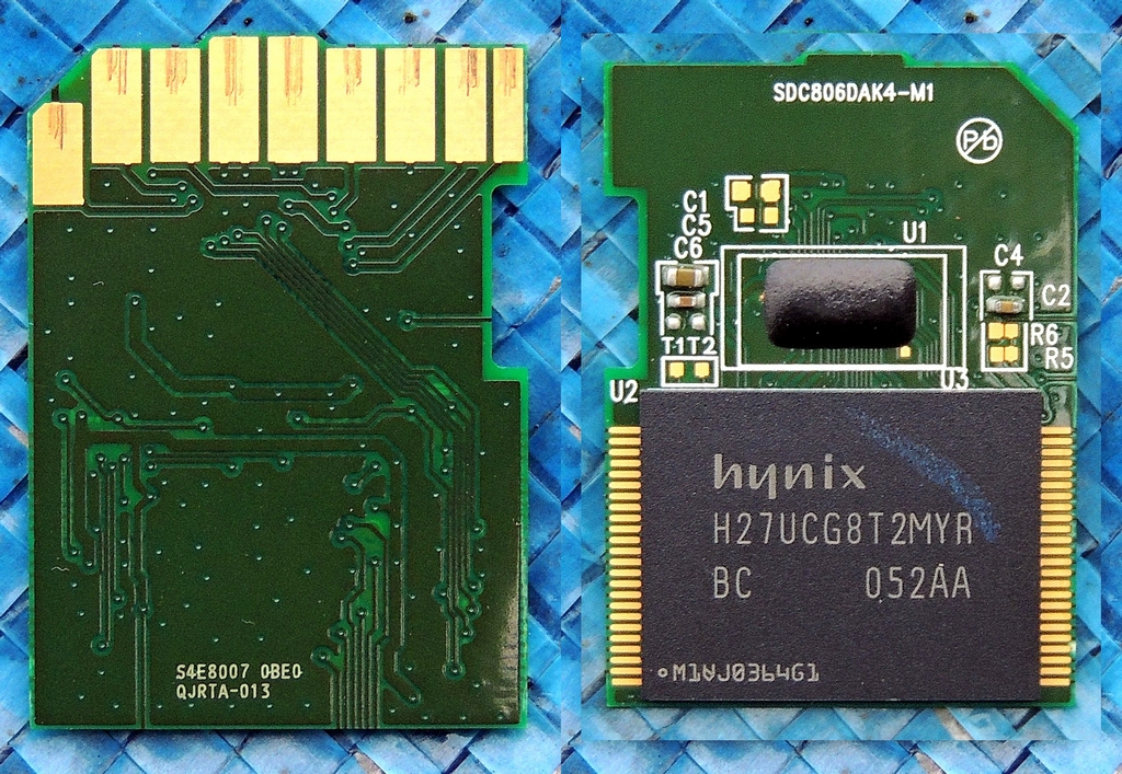 SD CARD moteur et stockage